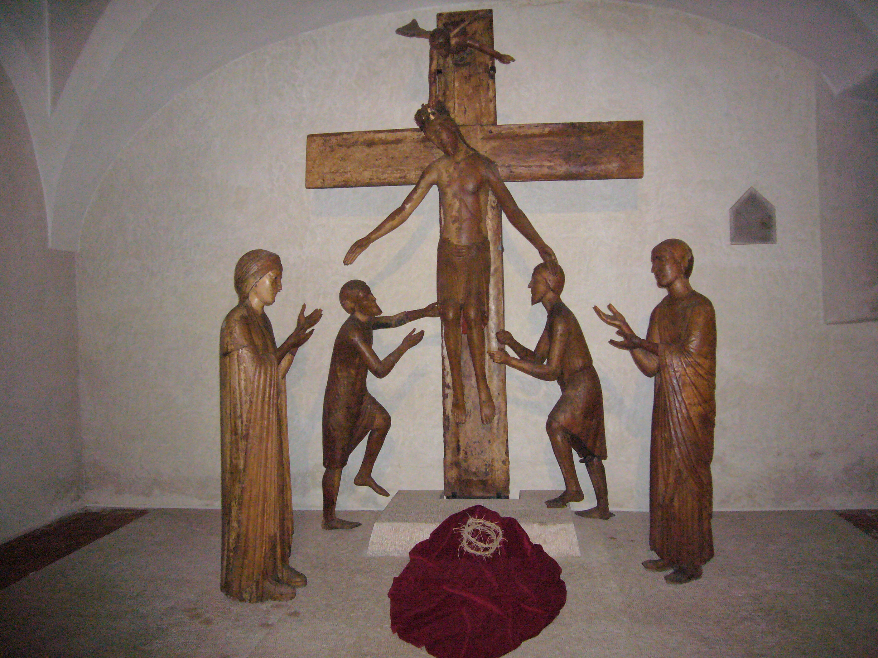 Tivoli, Deposizione di Cristo. Cattedrale di San Lorenzo. Opera lignea di scuola antelamiana del XIII secolo, originariamente nella chiesa di San Pietro. Dal dicembre 2015 al dicembre 2016 esposta nel locale Museo civico.